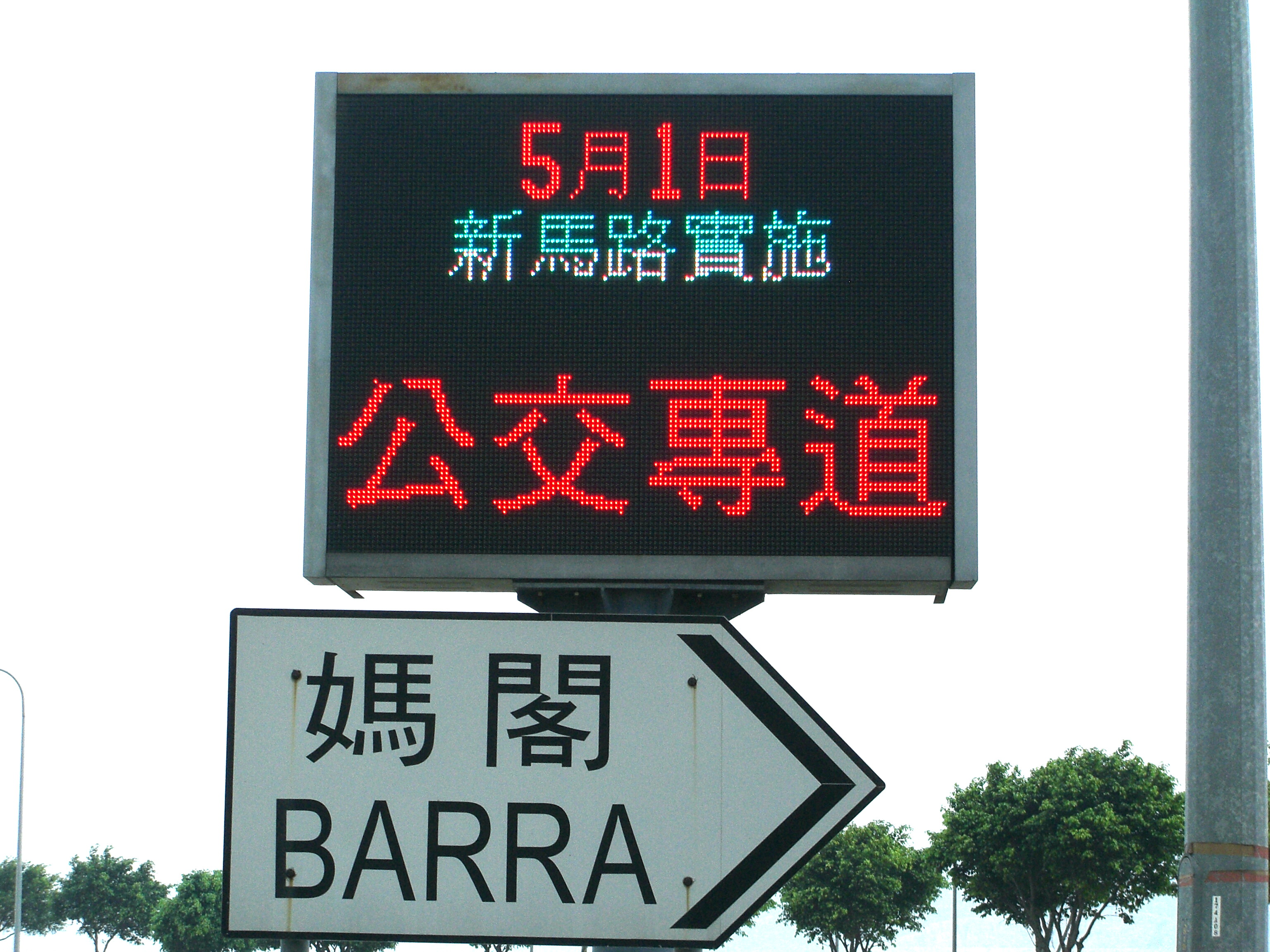 預告5月1日新馬路實施公交專道